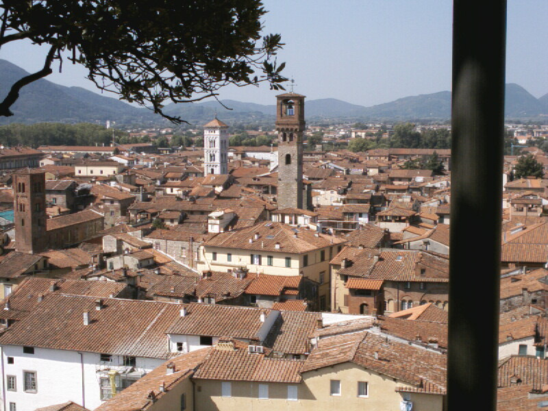 Blick über Lucca vom Turm auf dem Palazzo Guinigi